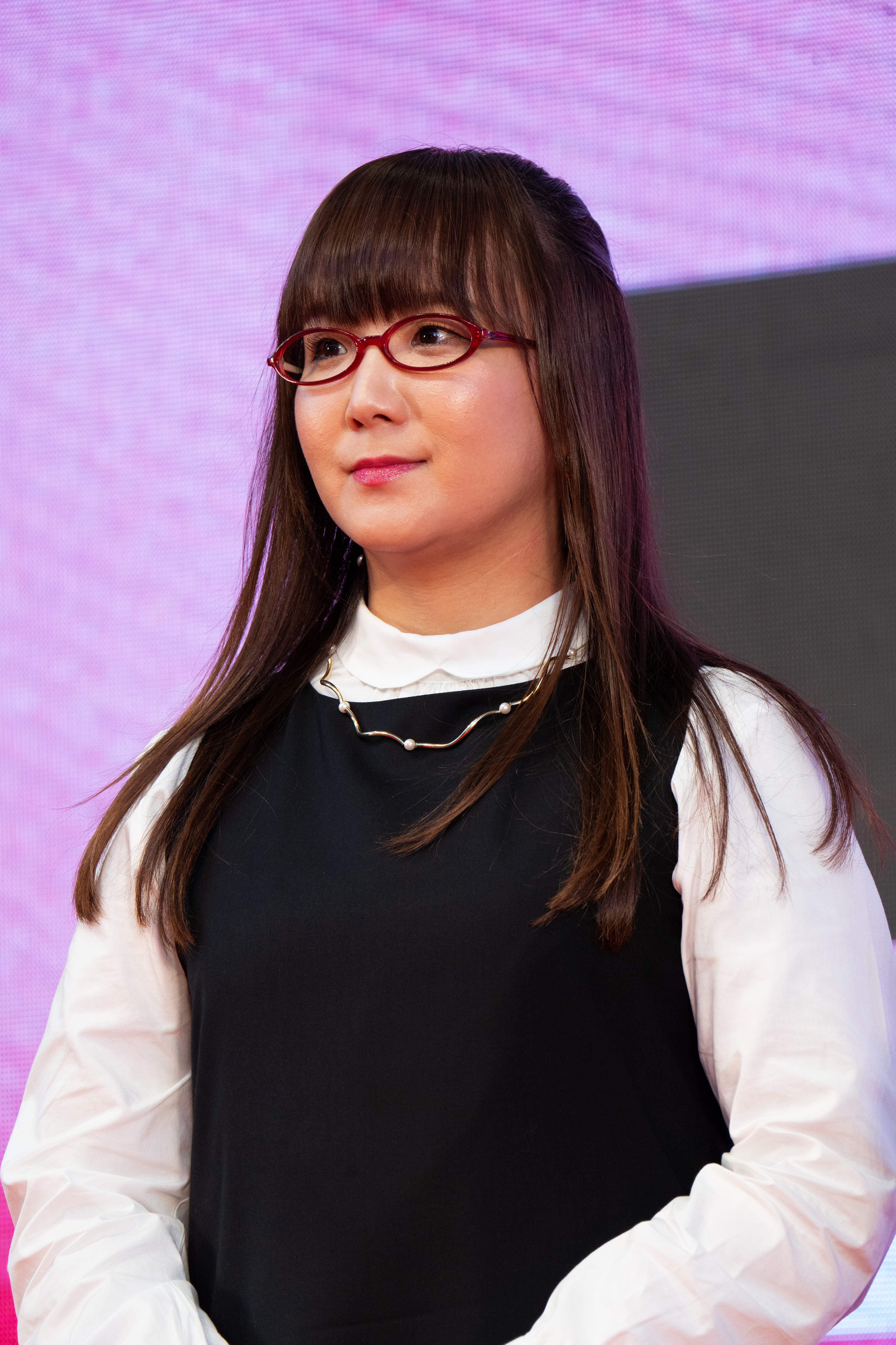 第32回 東京国際映画祭 オープニングセレモニー 奥華子 (殺さない彼と死なない彼女)